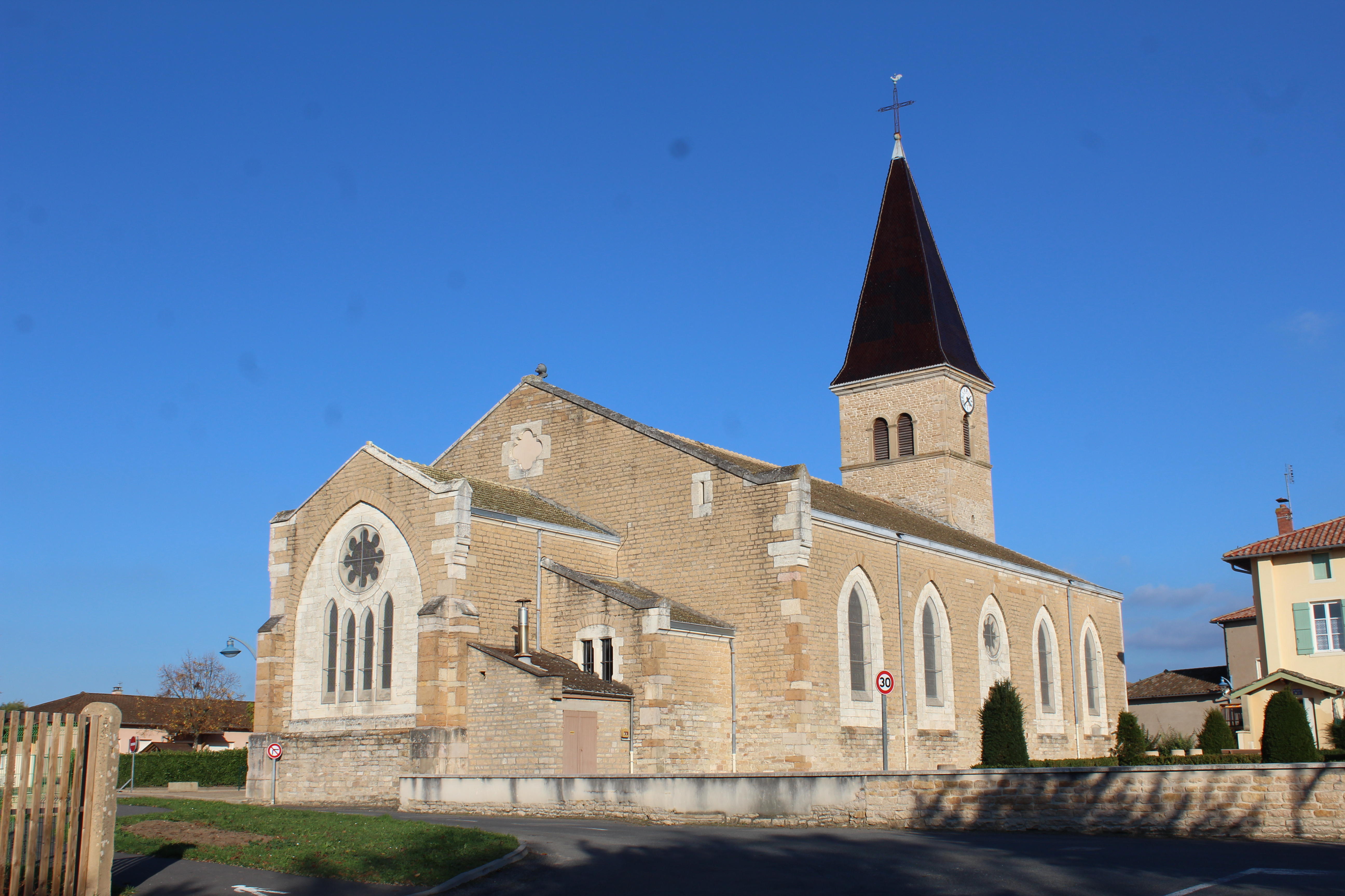 Église de Manziat.